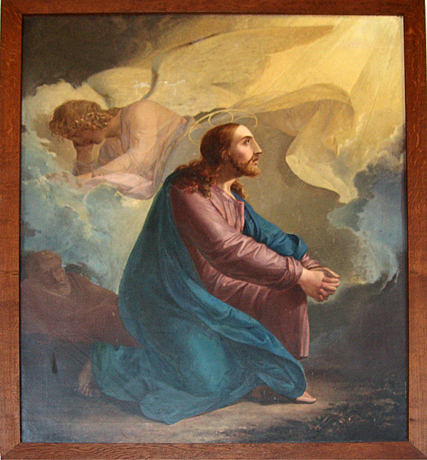 Maleri der tidligere sad i altertavlen Borum Kirke, Århus Kommune, Denmark